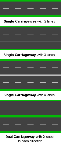 Paling atas: Jalan raya tunggal dua lorong Kedua atas: Jalan raya tunggal tiga lorong Kedua bawah: Jalan raya tunggal empat lorong Paling bawah: Jalan raya kembar empat lorong (dua lorong bagi setiap hala)